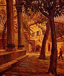 Atik Ali Pasha Mosque